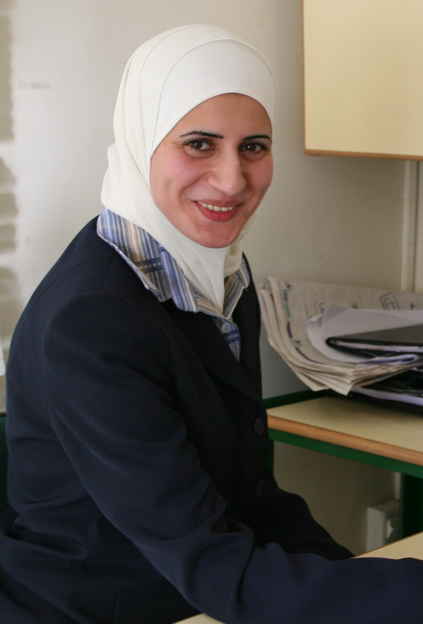 Woman in Amman, Jordan